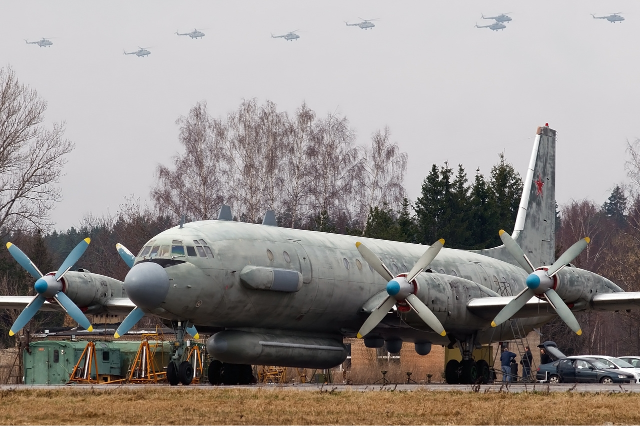 Ил-20М (бортовой №21 красный, cn 173011504) на ародроме Кубинка